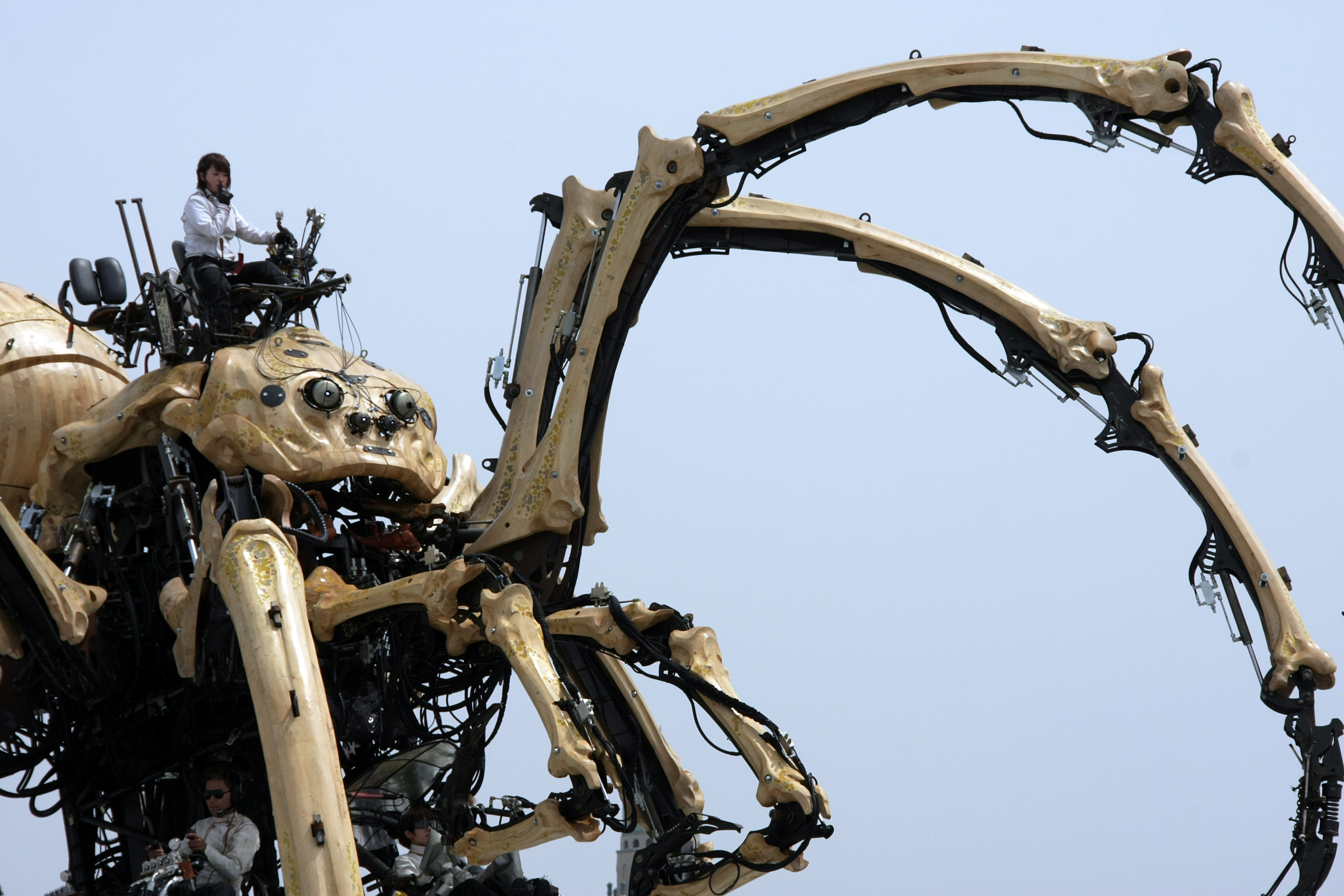 "La Machine" Yokohama Japan